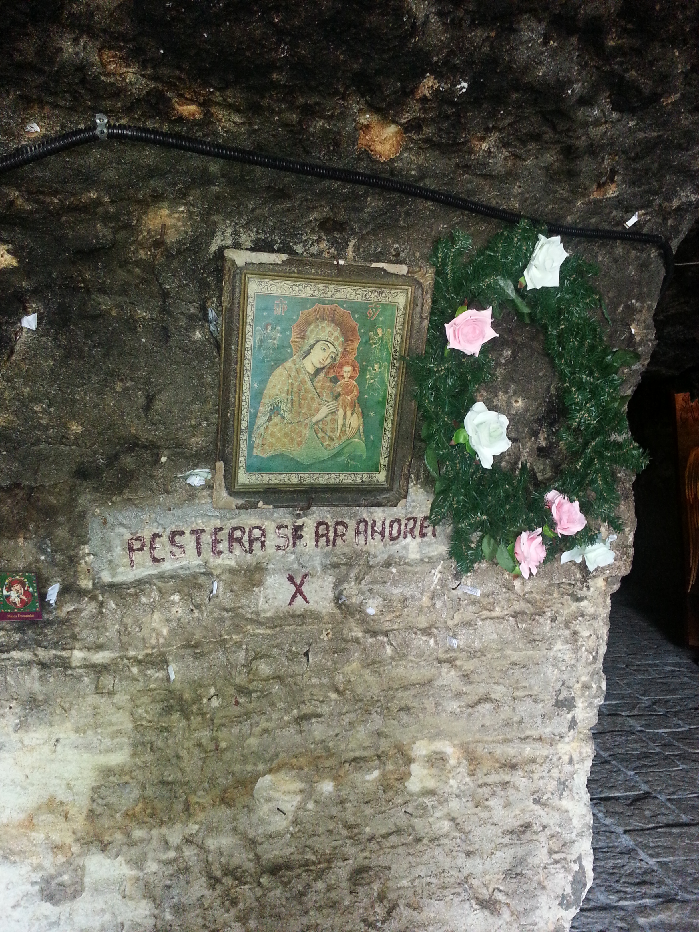 Peșterile „Sf. Apostol Andrei”